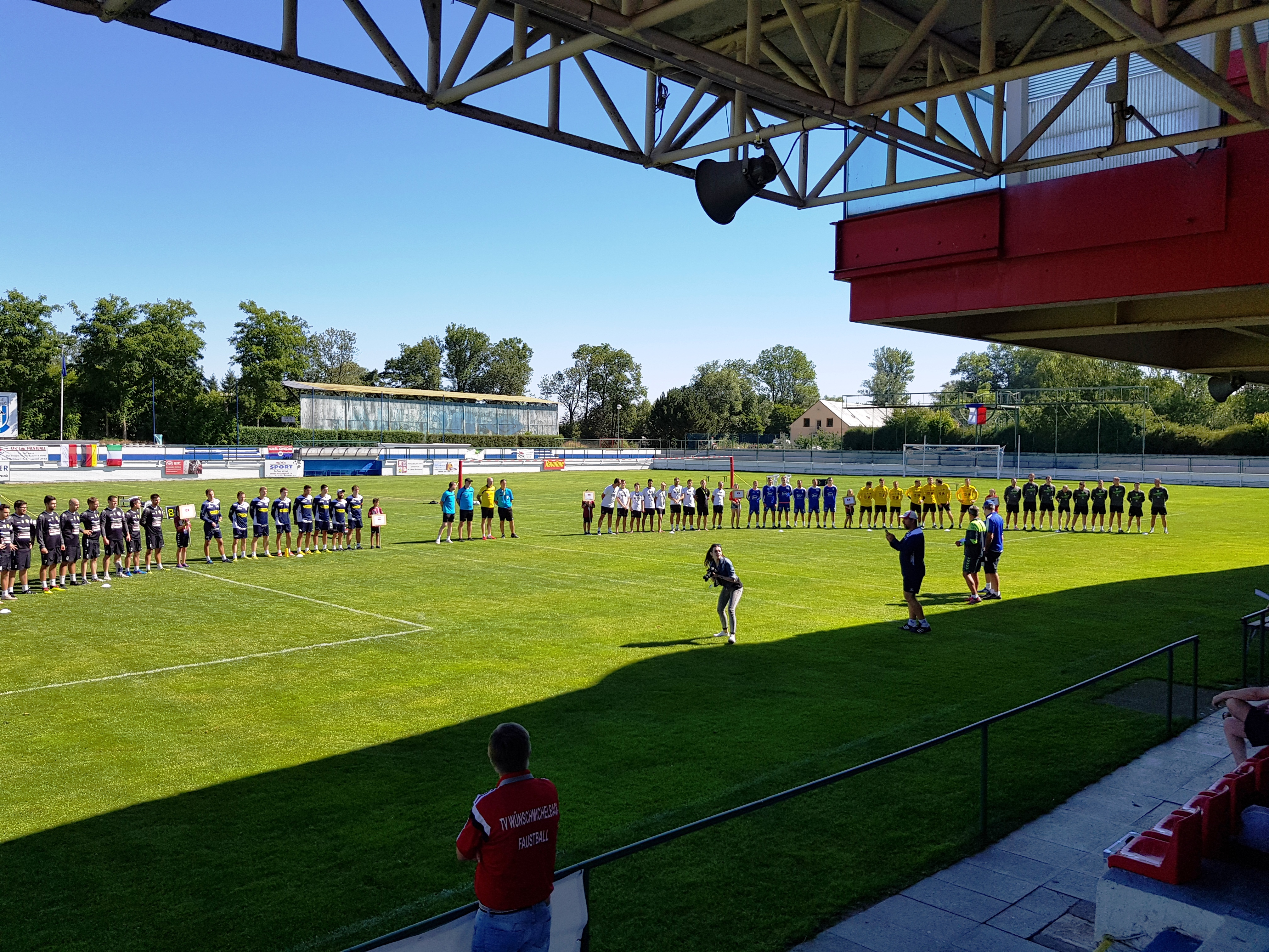 De Sportplatz vo Lázně Bohdaneč bi de Eröffnig vom EFA European Cup vo de Manne 2018.